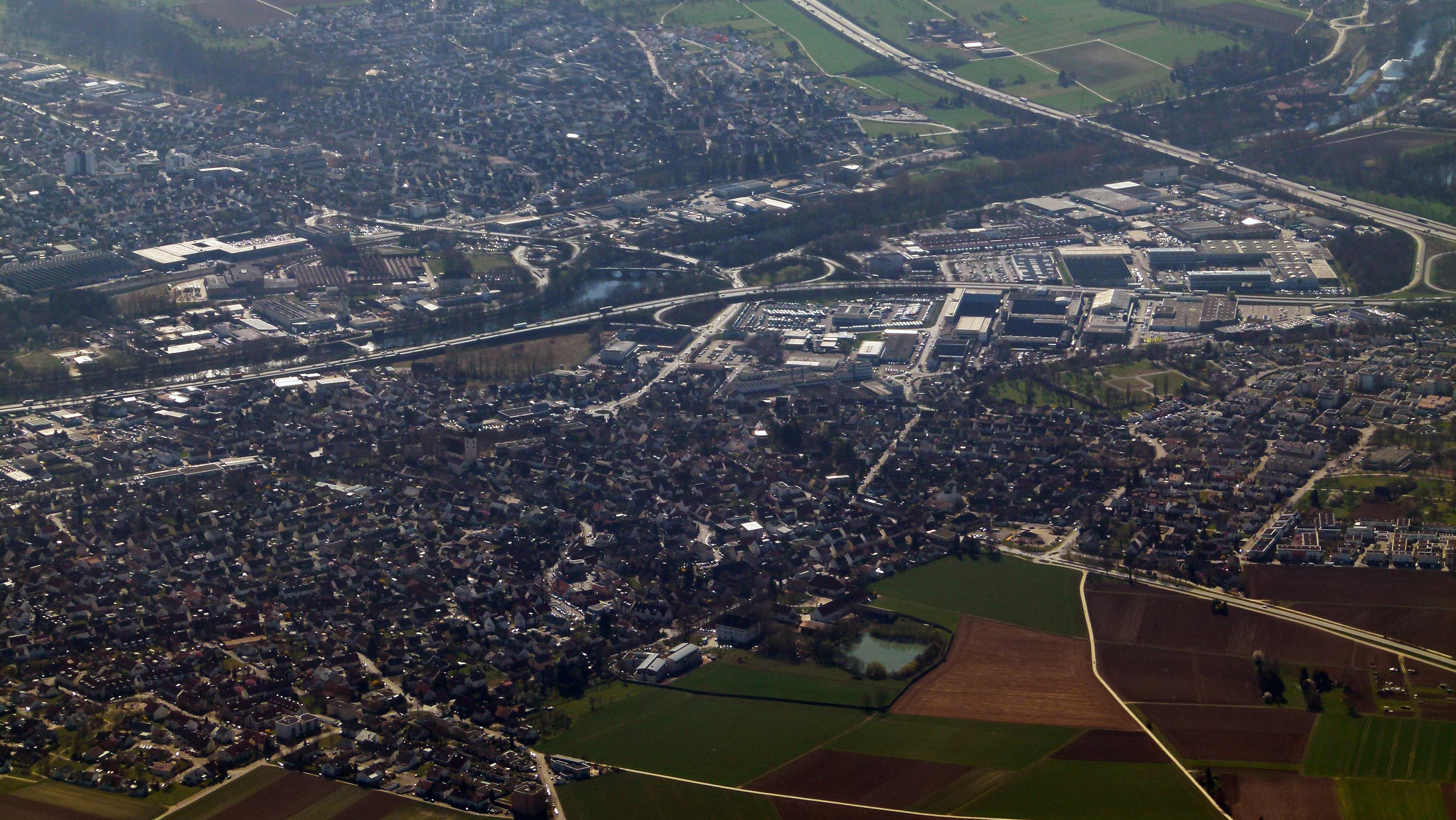 Luftbild von Köngen (unten) und Wendlingen am Neckar (oben) in Baden-Württemberg